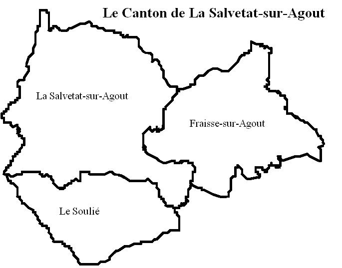 Le canton de la Salvetat sur Agout Image personnelle